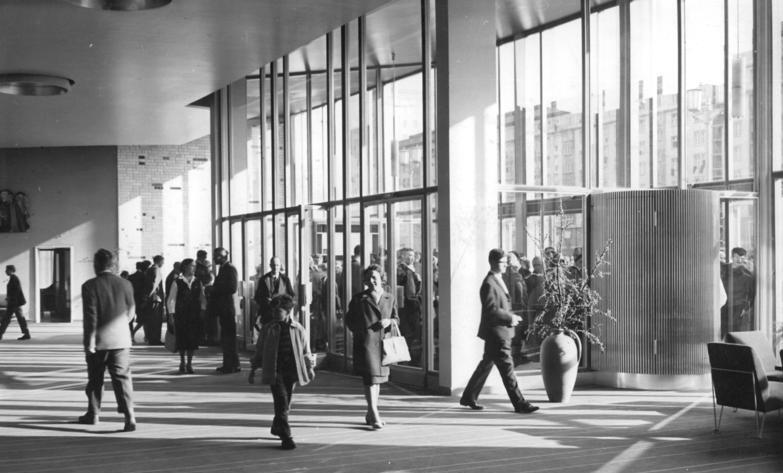 Berlin, Karl-Marx-Allee, Kino "Kosmos", Foyer Zentralbild Krueger Pu-Pru 7.10.1982 33.Jahrestag der DDR Festplatz Karl-Marx-Allee Viele Berliner verbanden ihren Gang durch das Festtagsgetriebe mit einem Besuch in den neuen Kino Kosmos.